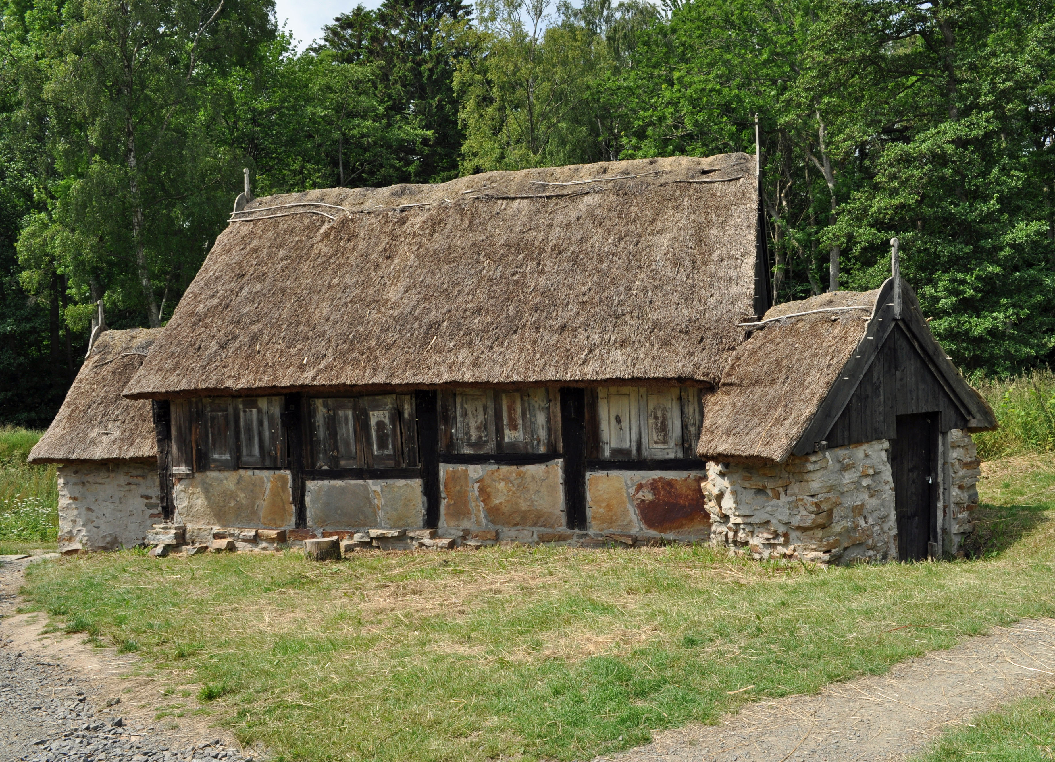 Slusegård, Bornholm (2012-07-05), by Klugschnacker in Wikipedia (7)